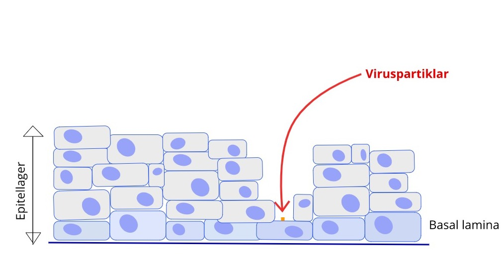 Papillomvirus når sina målceller via små skador i epitelet, s.k. mikroabrasioner där de infekterar cellerna.